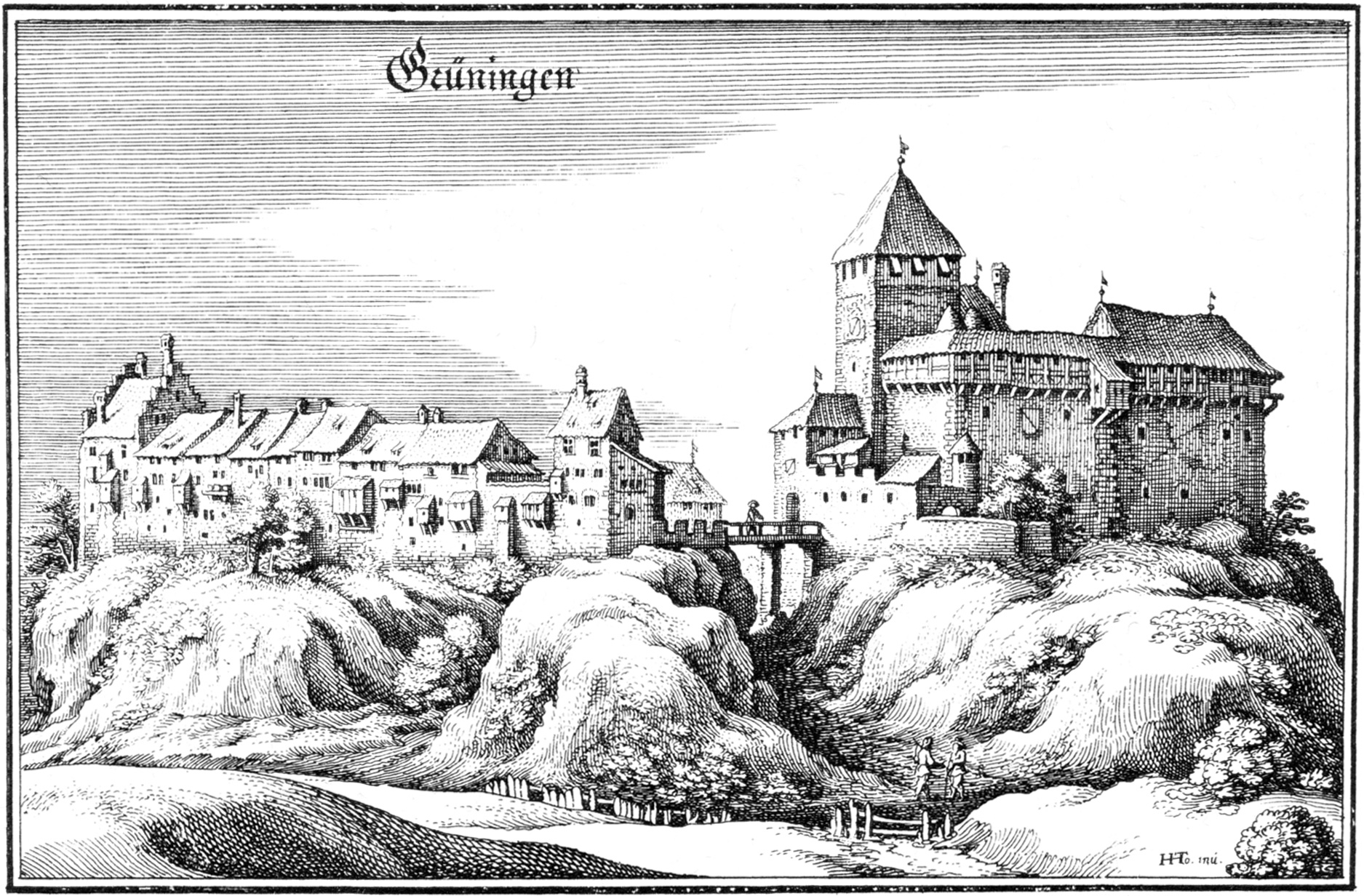 Stadt und Schloss Grüningen im Kanton Zürich, Schweiz, in der Topographia Helvetiae von Matthäus Merian. Ca. 1650